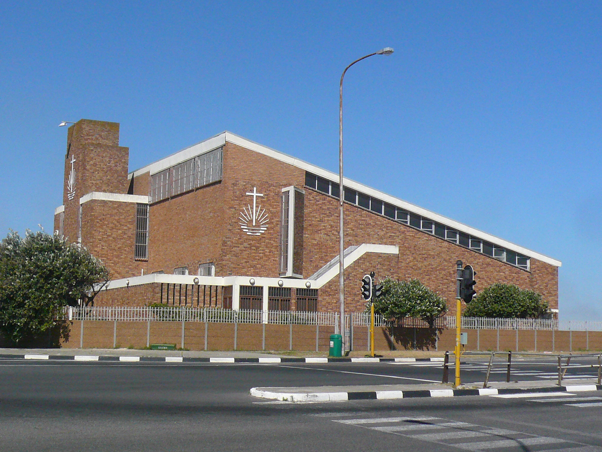 Neuapostolische Kirche in Tafelsig (dort gibt es mind. 3 Kirchen), Kapstadt, Südafrika